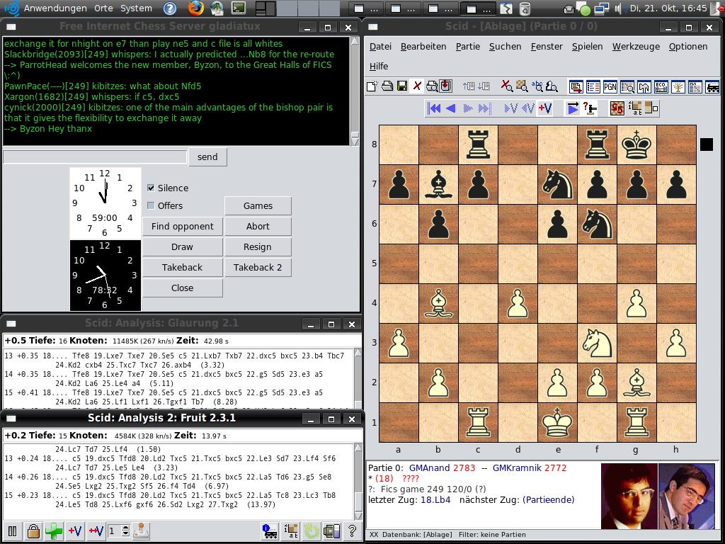 Bildschirmfoto der freien Schachsoftware SCID während der Übertragung der 5. Partie der Schach-WM in Bonn 2008 auf der Free Internet Chess Server (FICS)/ Screenshot of SCID taken during the broadcast of the 5th game of the 2008 chess-world-championship at Bonn/Germany via the Free Internet Chess Server (FICS).